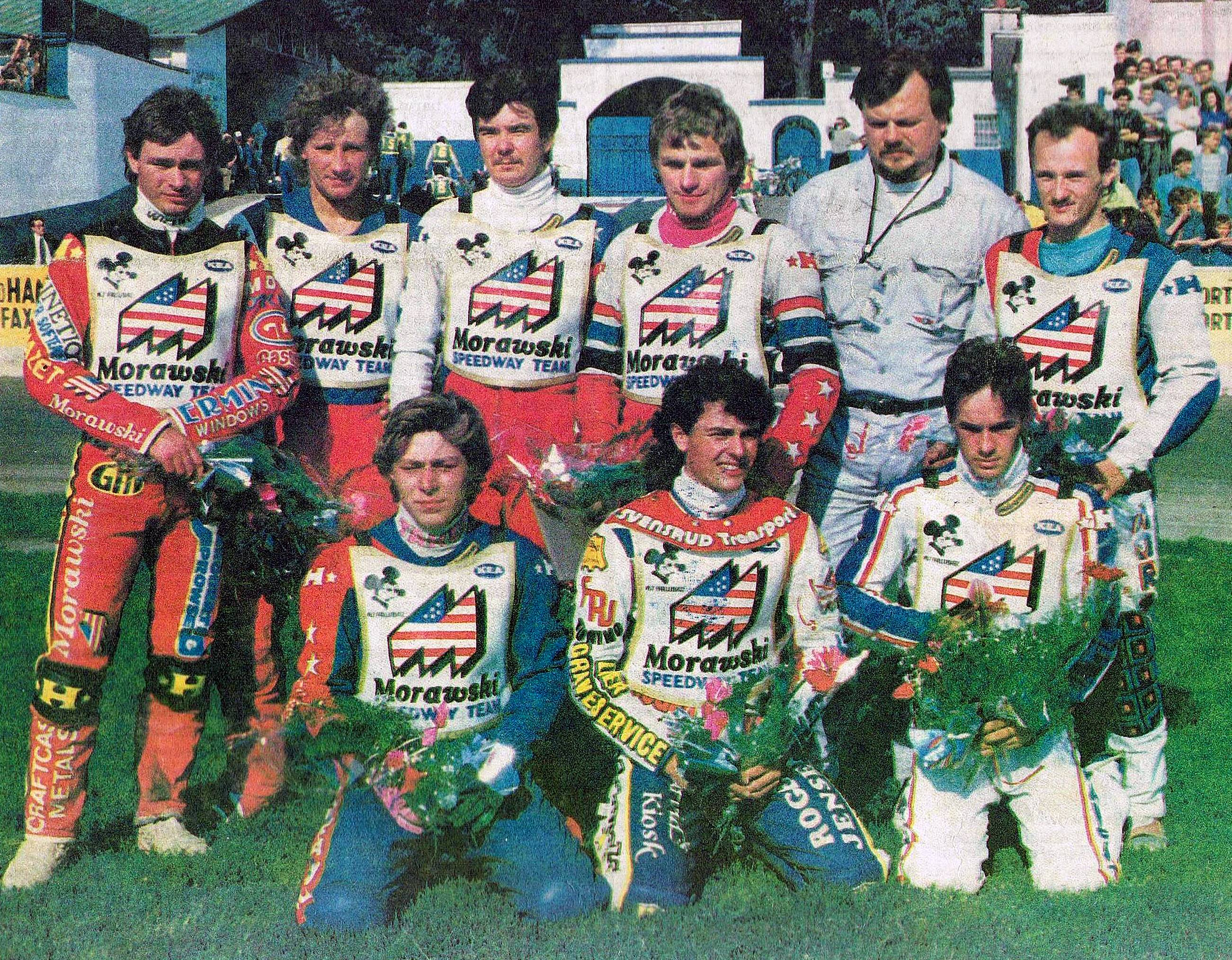 Morawski(Falubaz) Zielona Góra - Mistrz Polski 1991. Stoją od lewej: Jimmy Nilsen, Jan Połubiński, Sławomir Dudek, Andrzej Huszcza, trener Czesław Czernicki, Jarosław Szymkowiak. Klęczą: Andrzej Zarzecki, Lars Gunnestad, Artur Pawlak.